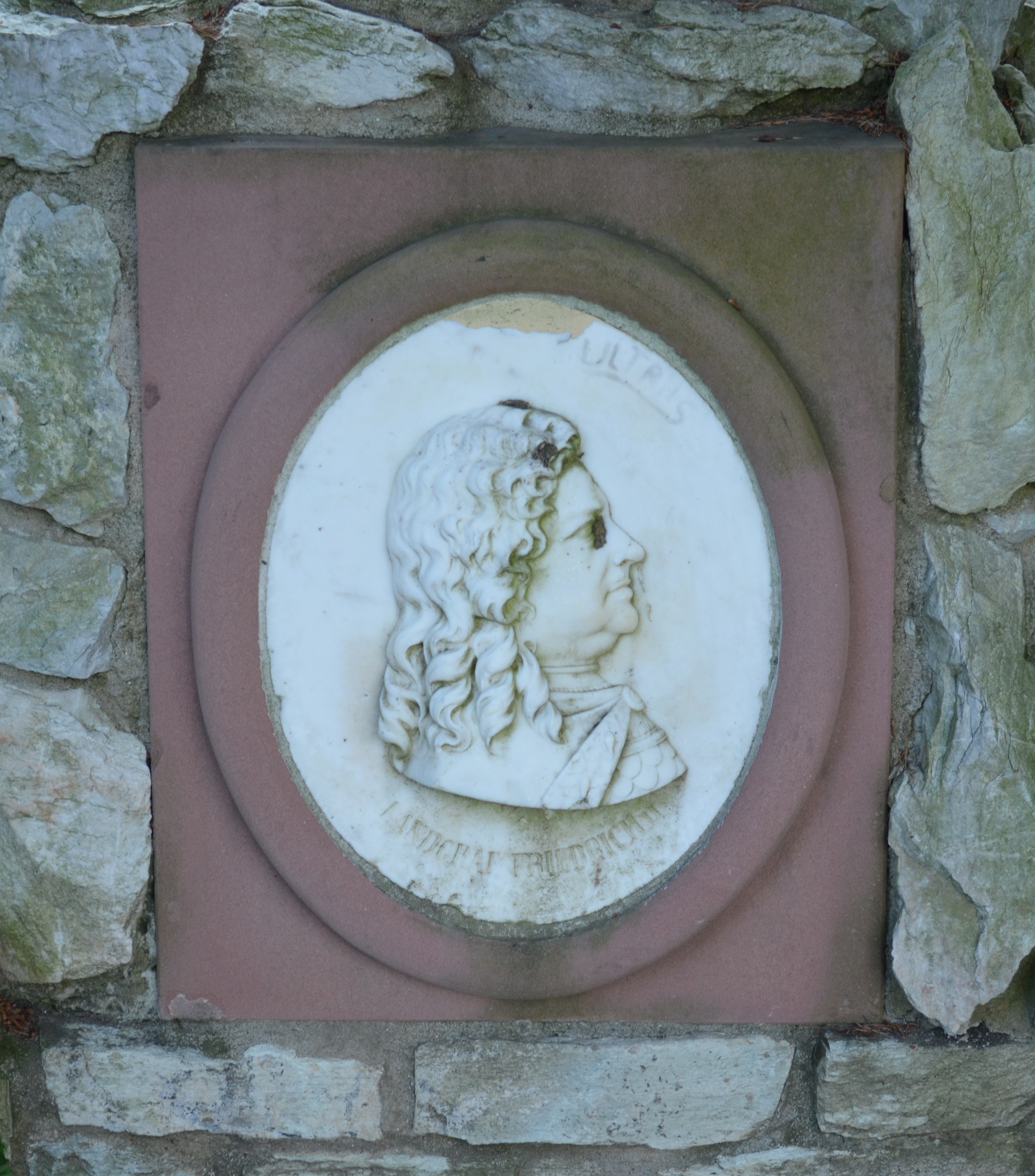 Bad Homburg, Landgrafendenkmal, Tannenwaldallee, Landgraf Friedrich II